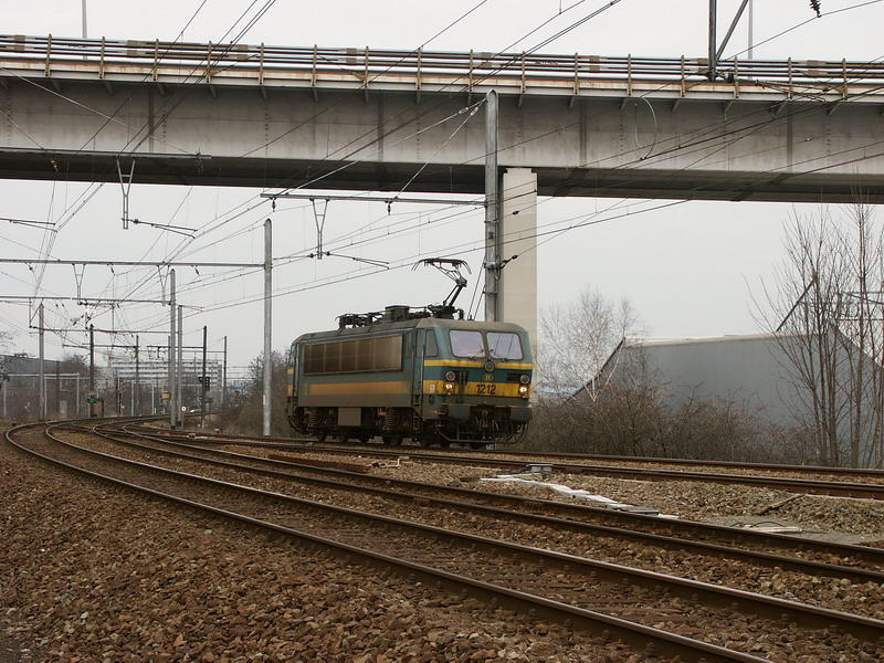 La HLE 1212 de la SNCB au passage à Machelen.